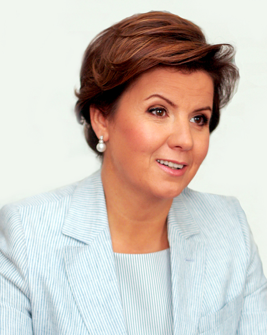 Ставнійчук Марина Іванівна